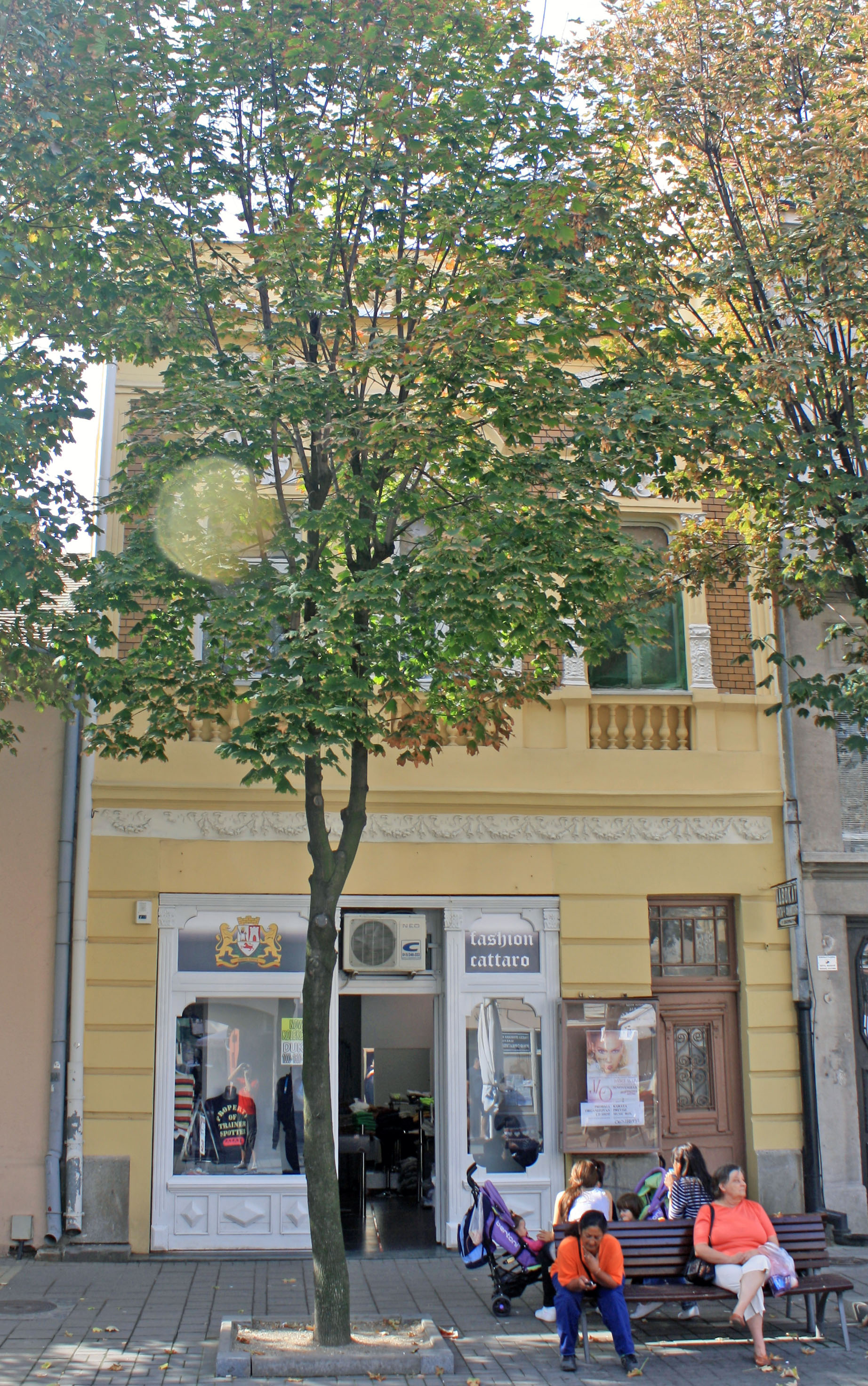 Пошаљи фотографију Кућа Павла Станића, улица Господар Јевремова број 21.